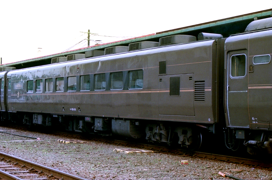 国鉄 キハ59系気動車「アルファコンチネンタルエクスプレス」 JTBパノラマエクスプレス キハ59 101